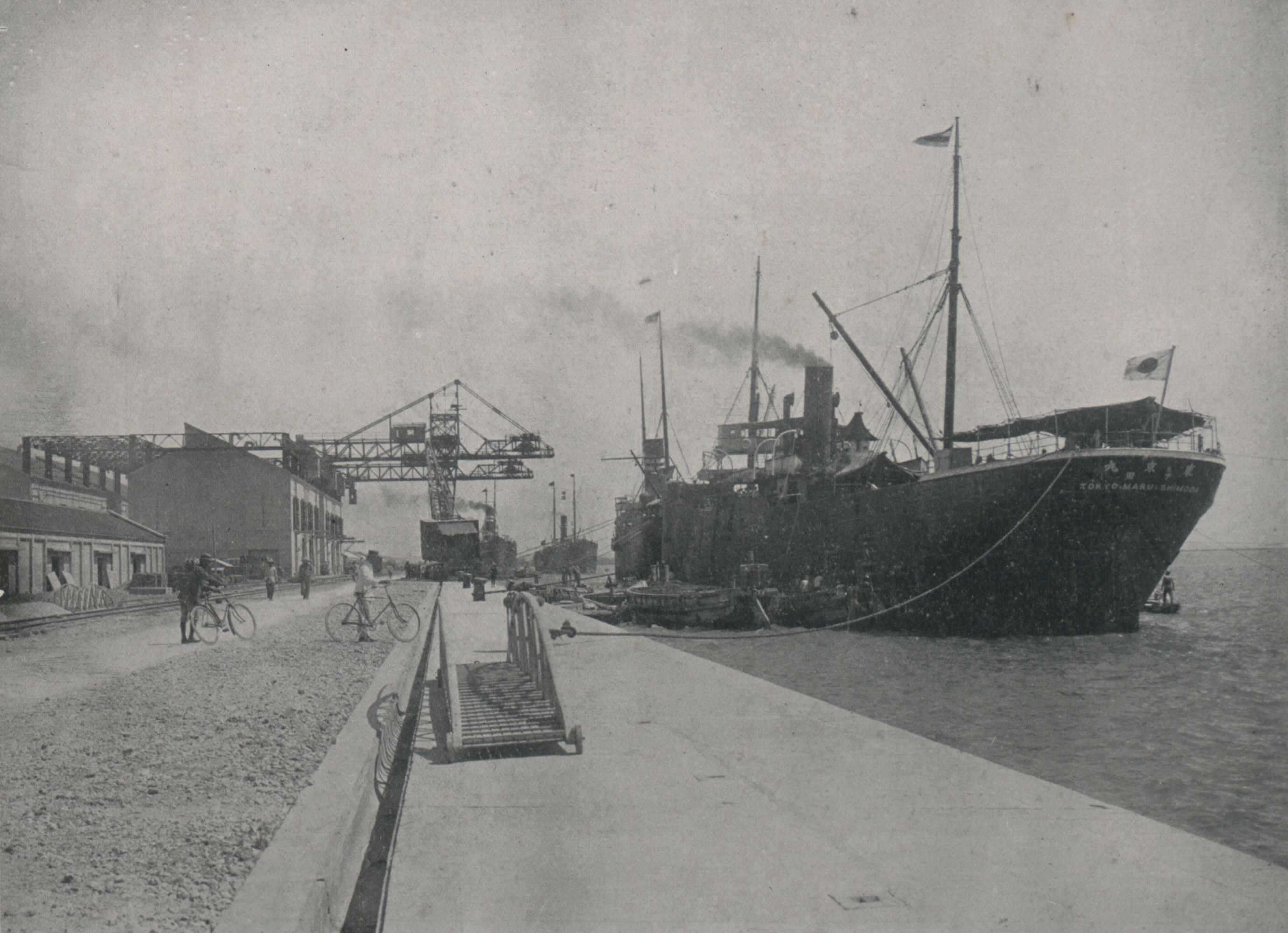 中文（台灣）: 打狗港內的岸壁